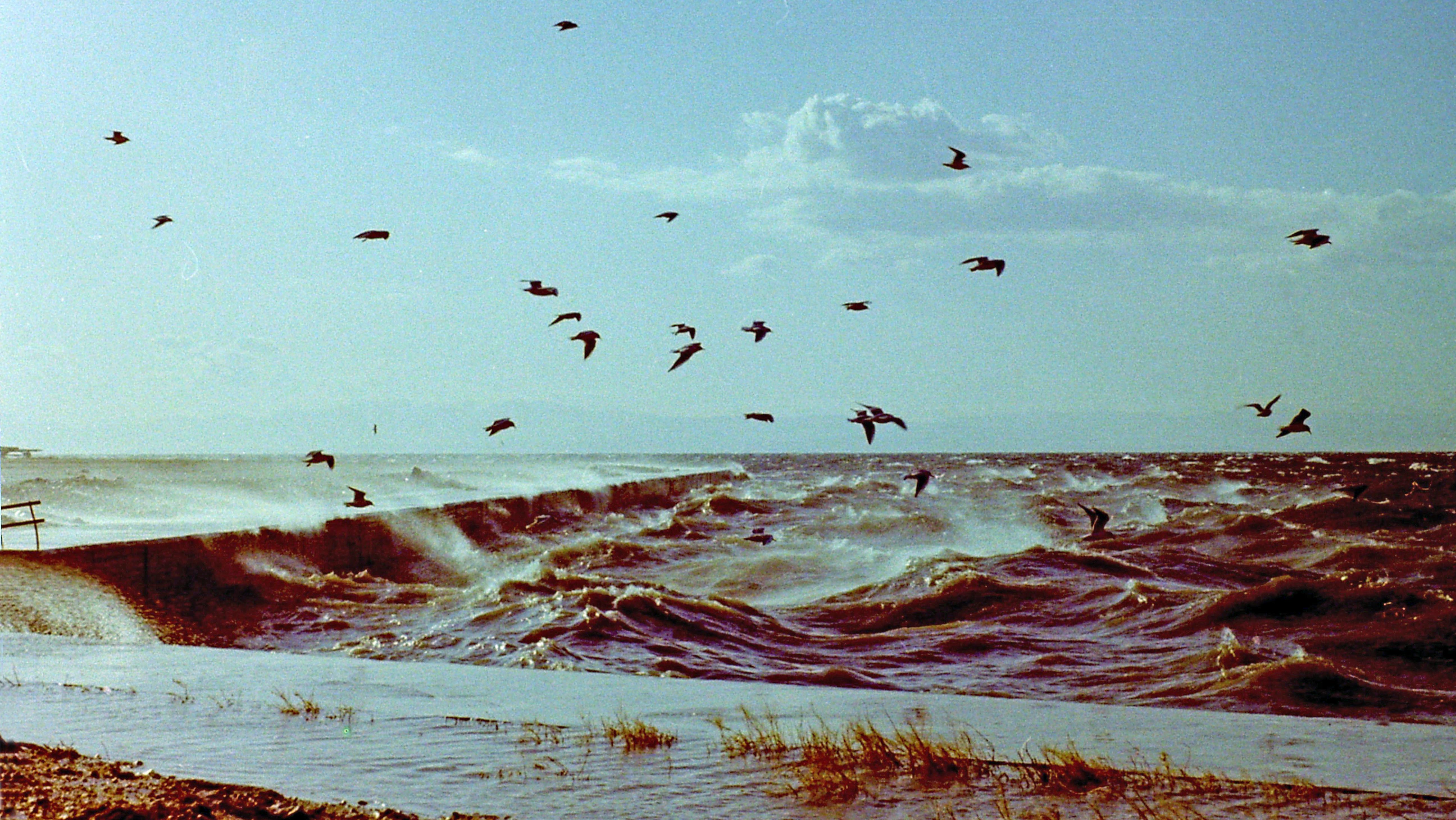 Χώρος Μεγάρου Μουσικής Θεσσαλονίκης